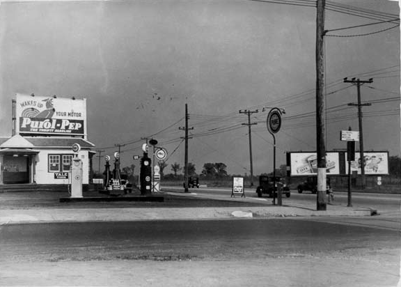 Фотография американской глубинки